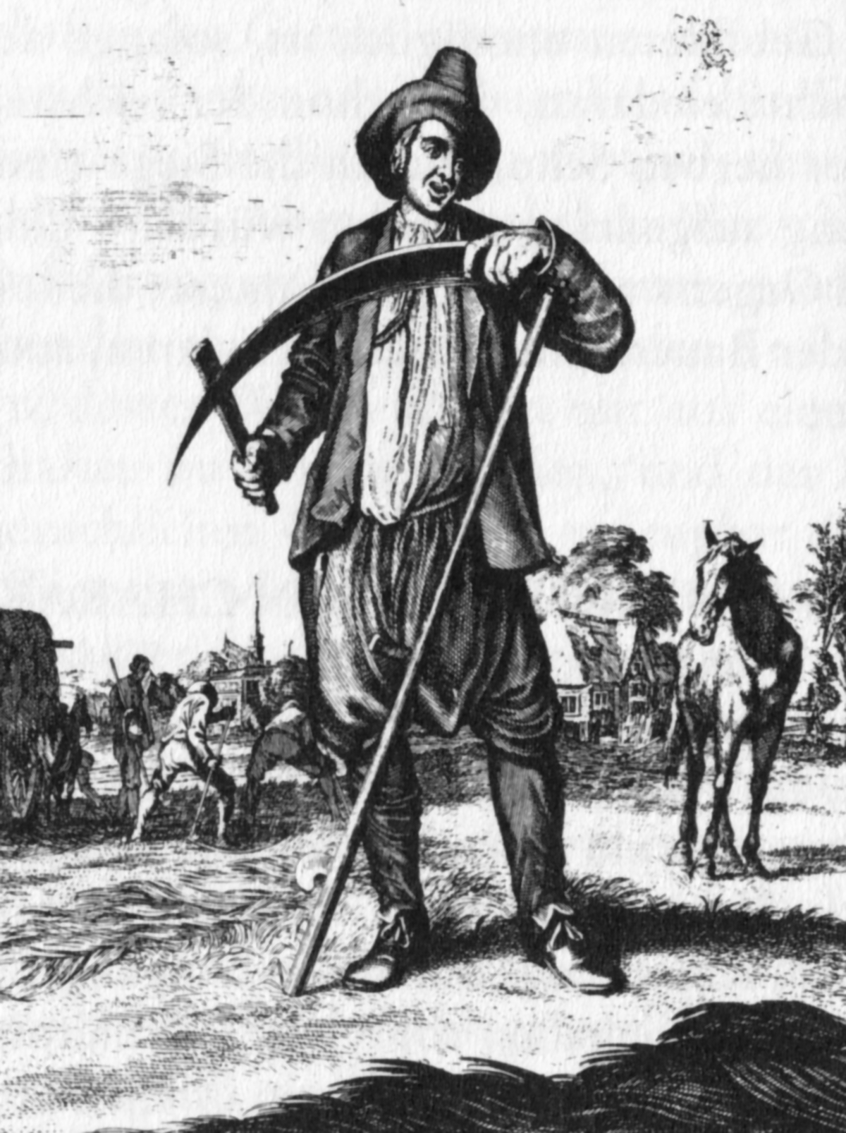 ein Bauer beim Schärfen einer Sense, Stich um 1700